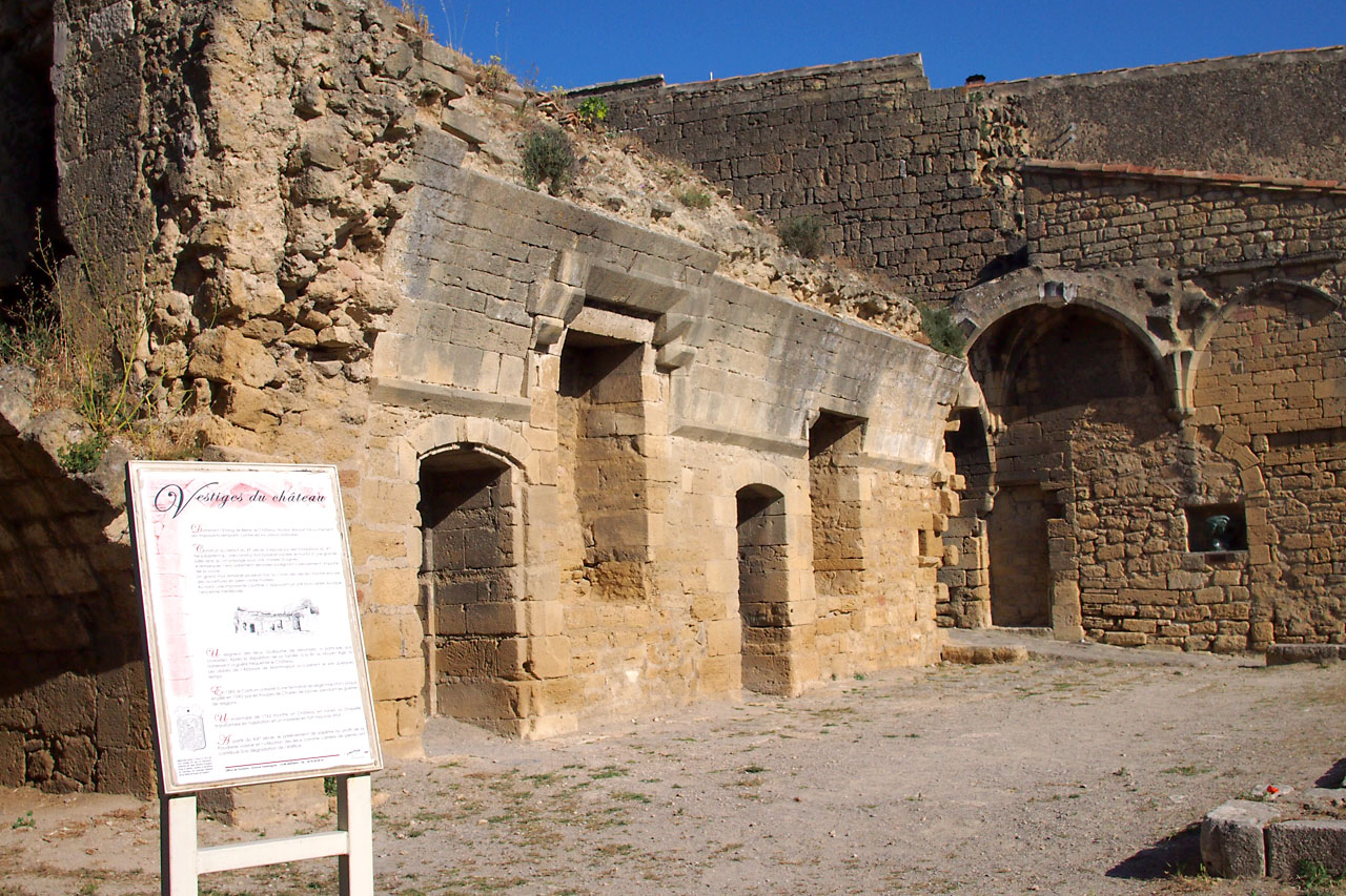 Miramas le Vieux Vestiges du chateau